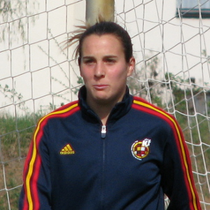 Priscila Borja Moreno, spanische Nationalspielerin